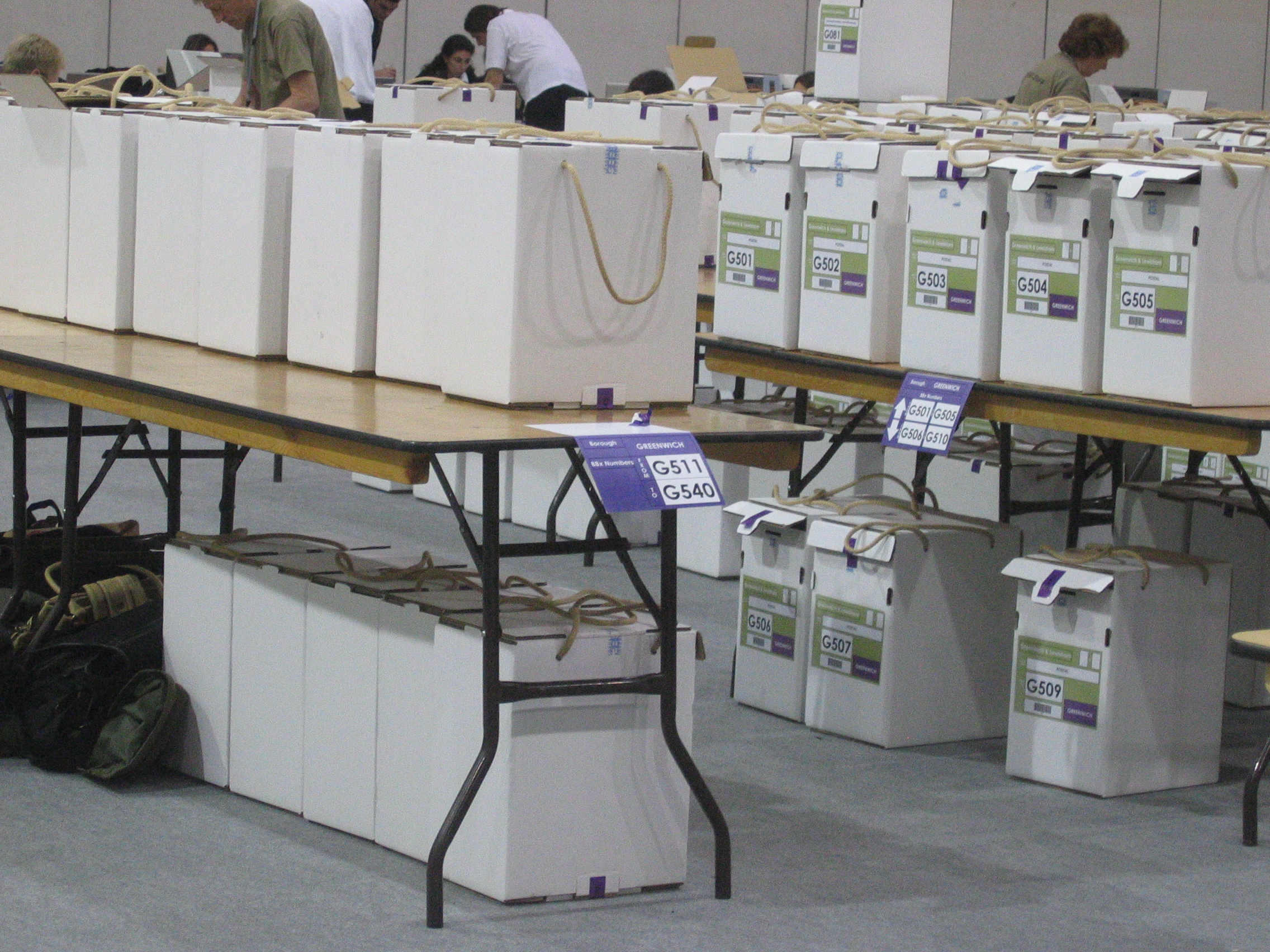 London Elections 2008, Excel count centre. Ballot boxes.